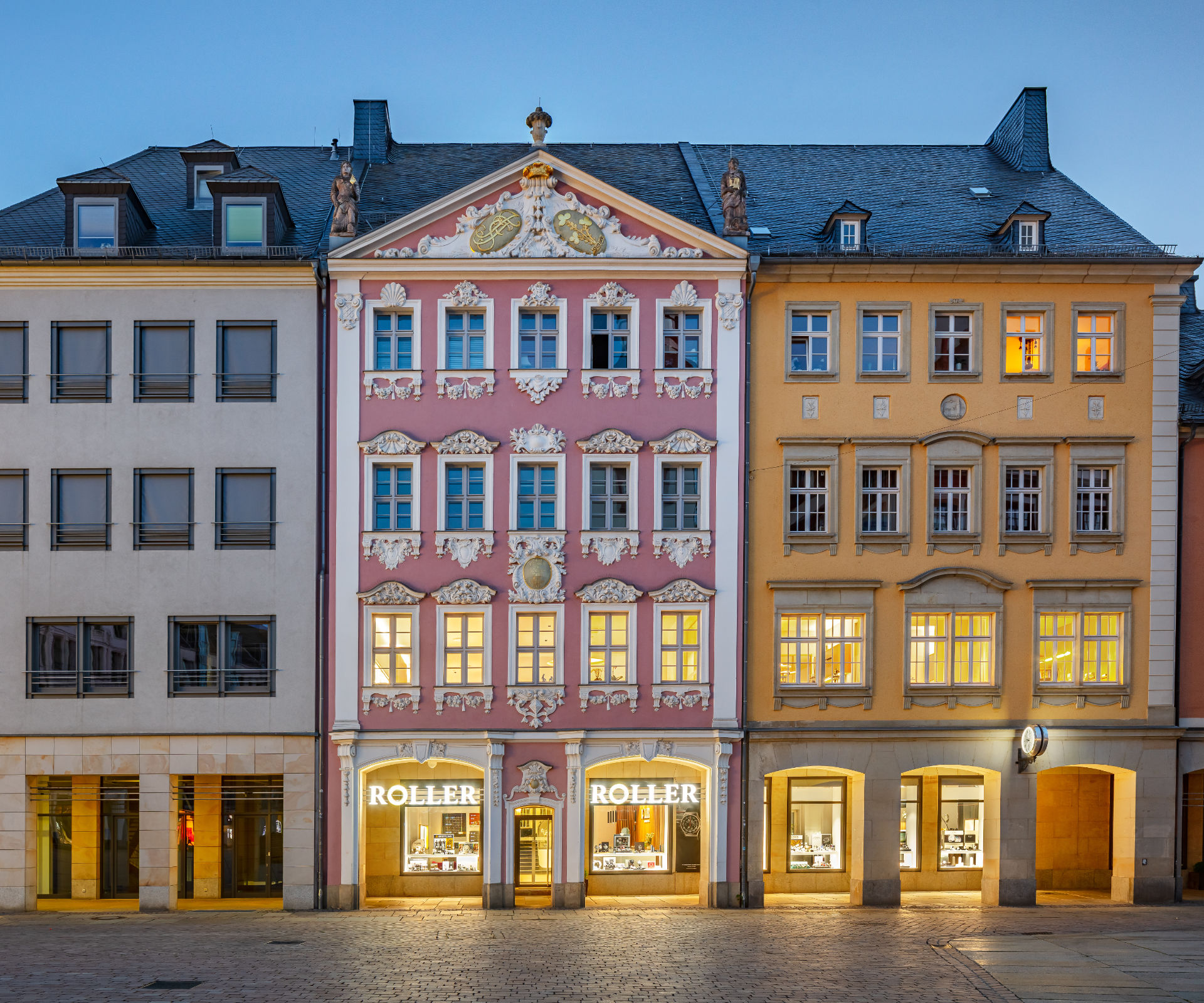 Geschäft Markt 20/21